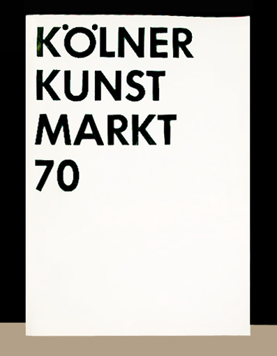 Kölner Kunstmarkt 1970, Katalogtitel